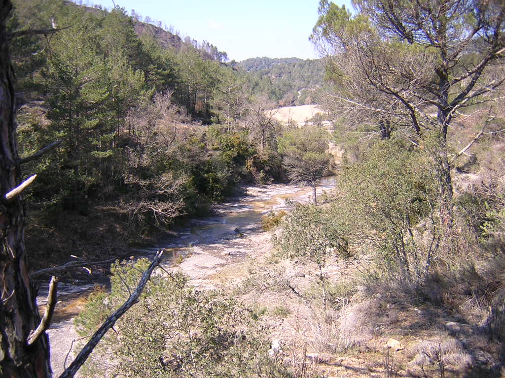 El torrent de Caldat, o de la Baga del Coll